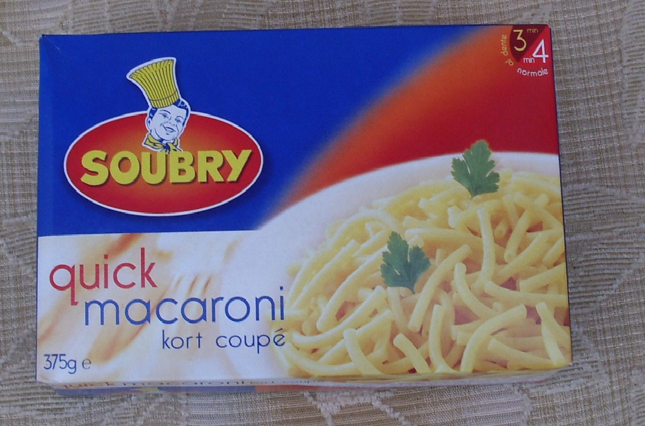 Soubry - Verbrandhofstraat - Roeselare - West-Vlaanderen - Vlaanderen - België